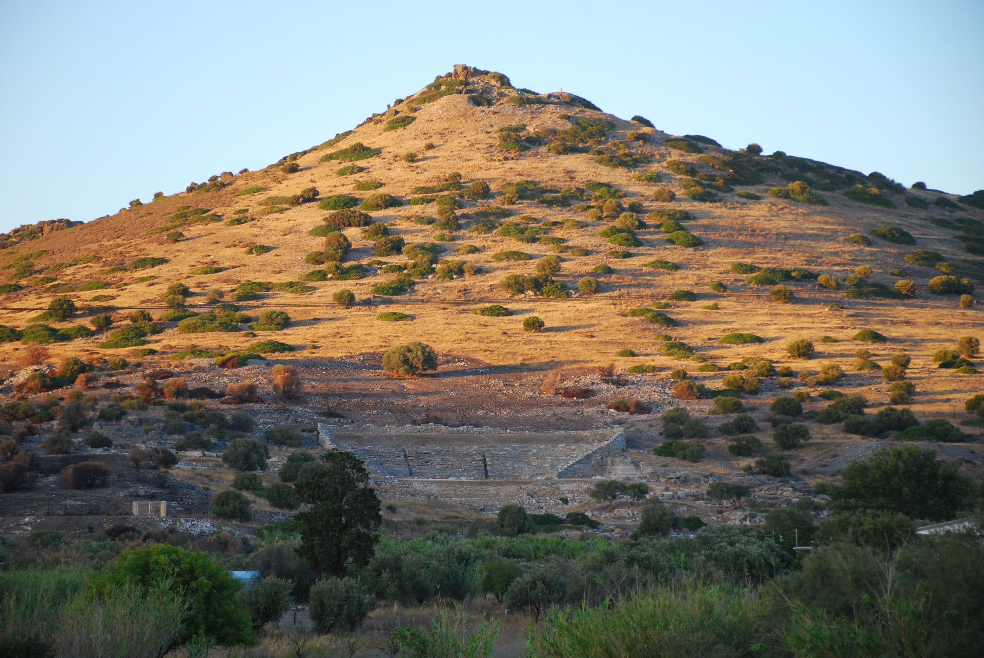 Θορικός«άγνωστο»